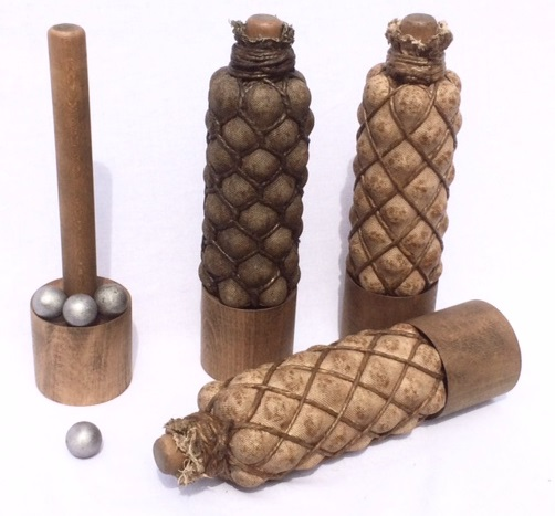 drei Traubenhagel (Rekonstruktionen im Kaliber 7,5cm) und ein Treibspiegel mit Mittelspindel und Kugeln, jeder Traubenhagel enthält 48 Kugeln á 25mm Durchmesser und wiegt 3,3kg